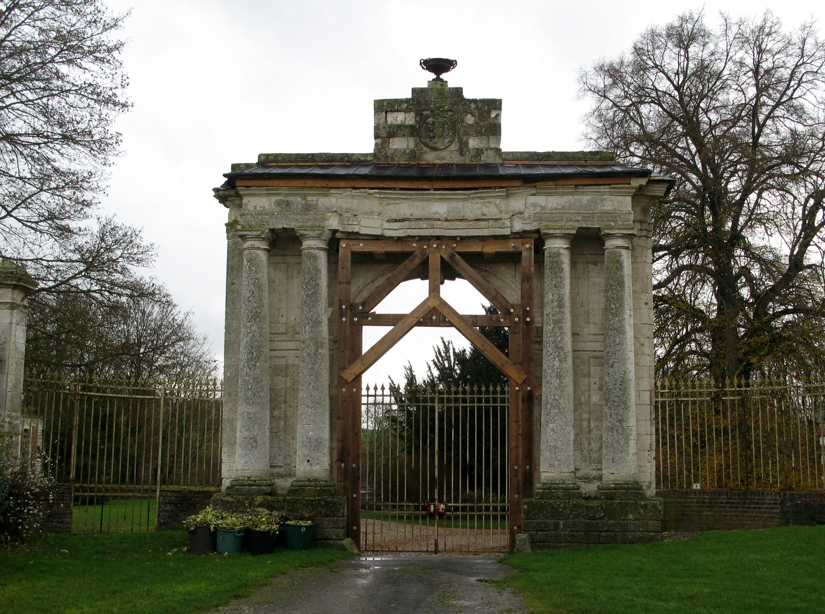 Oissy (Somme, France) - L'entrée du château, vue alors que la petite pluie d'automne semble juste s'arrêter. On remarque d'une part l'importance des renforts (poutres de bois) pour éviter l'effondrement, et d'autre part la "modeste" protection contre les infiltrations sur le dessus (sorte de petit toit étroit contitué d'une bâche de plastique maintenue par de courts morceaux de bois).